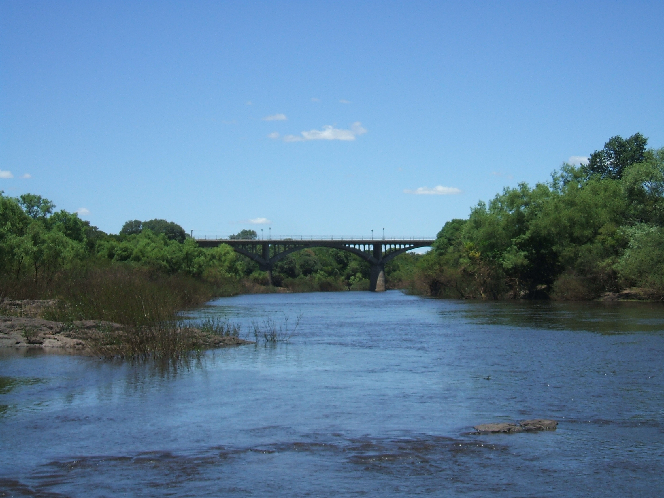 Puente Río Dayman